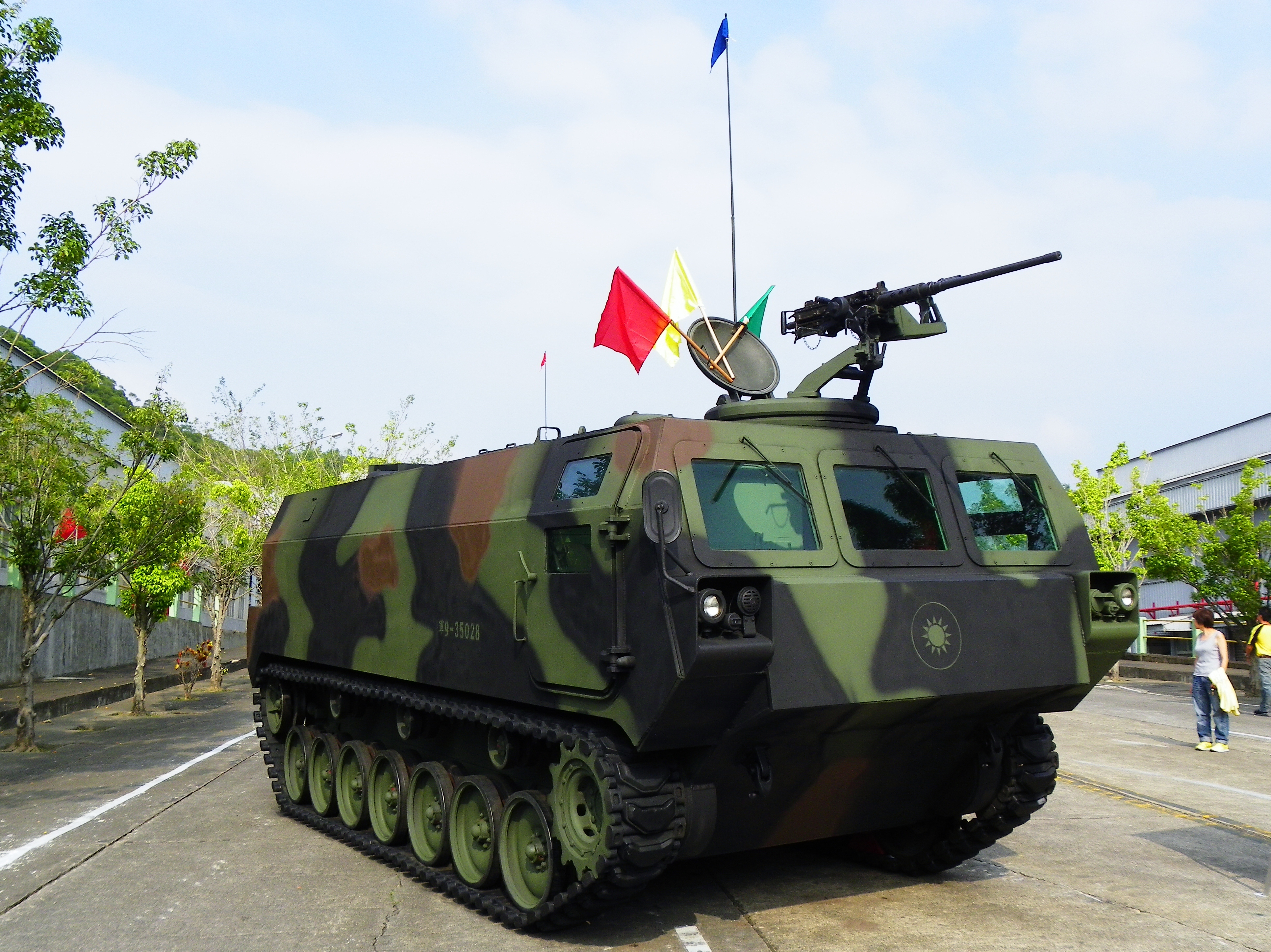 2012年兵整中心營區開放活動，岳崗路展示之CM-24彈藥運輸車。